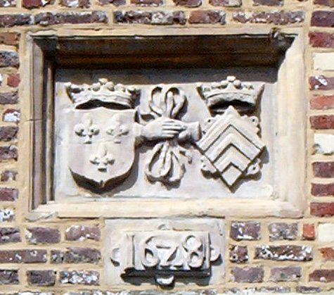 Steen in de zuidermuur van de kerk van Wimmertingen met het wapenschild van de familie de Rivière d'Arschot en dit van de familie de la Douve.